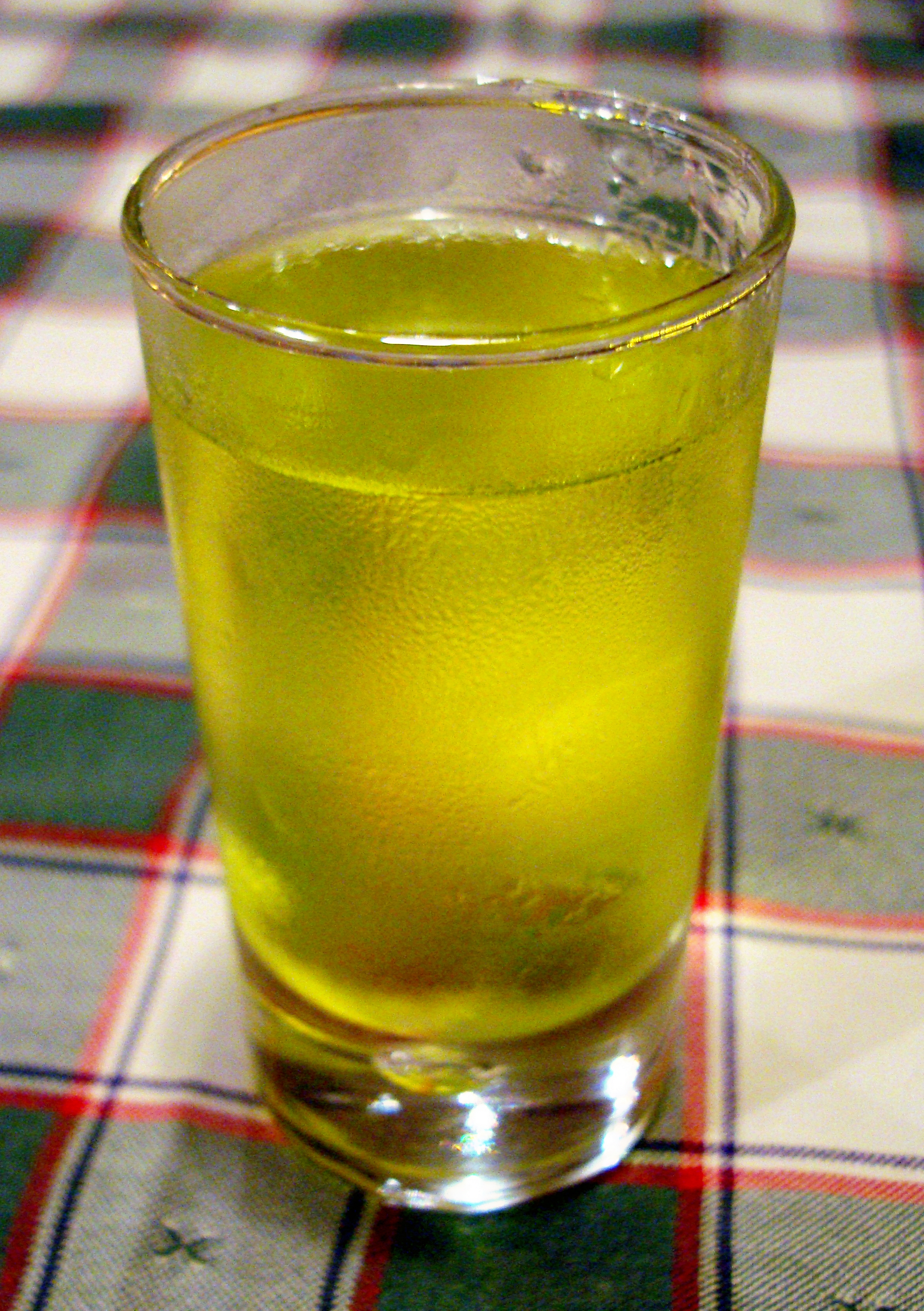 Ein Glas des Kräuterlikörs „Orujo de hierbas“